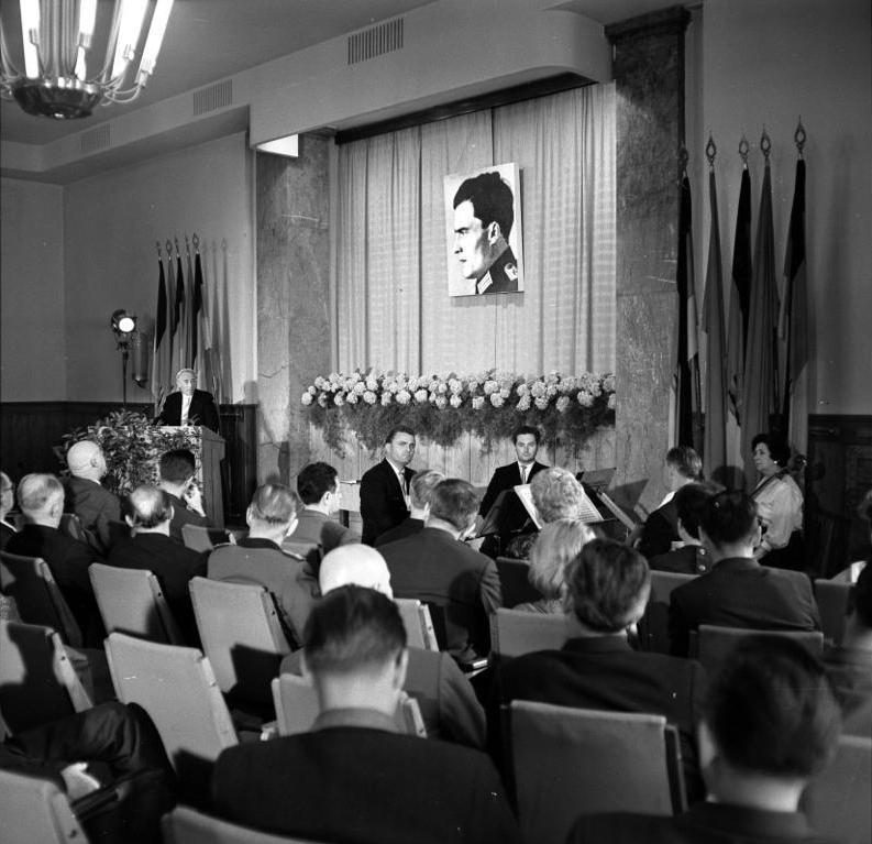 ADN-ZB-Spremberg Berlin: 20.7.64 Gedenkveranstaltung zum 20. Jahrestag des Attentats auf Hitler Anläßlich des 20. Jahrestages des Attentats auf Hitler am 20. Juli 1944 fand heute im Haus des Nationalrates eine Gedenkveranstaltung des Nationalrates und der Arbeitsgemeinschaft ehemaliger Offiziere statt. UBz. Übersicht während der Gedenkveranstaltung. Es spricht Prof. Dr. Heinrich Scheel, stellvertretender Direktor des Instituts für Geschichte der Deutschen Akademie der Wissenschaften zu Berlin.